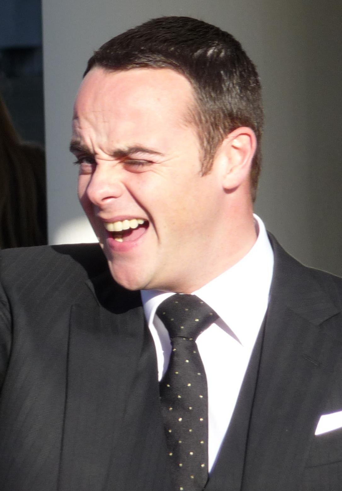 Ant McPartlin